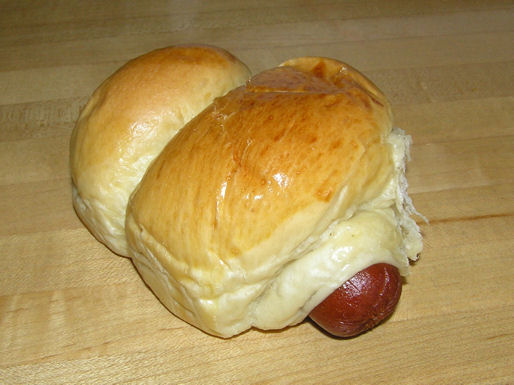 A Sausage bun